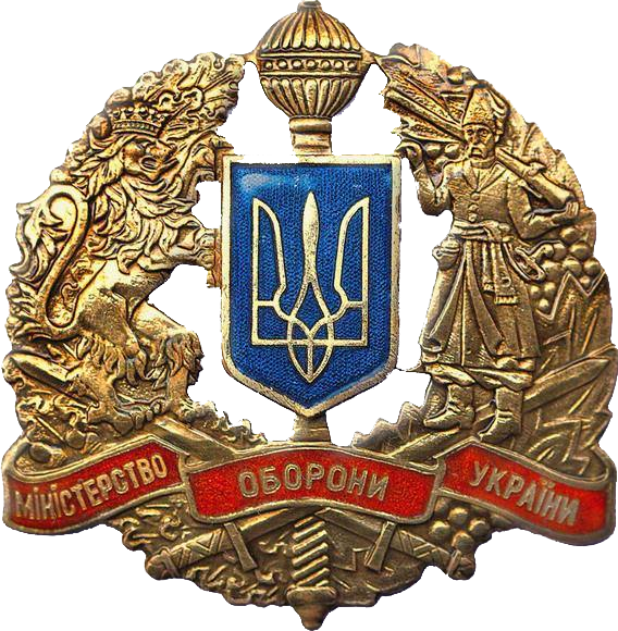 Нагрудний знак, Міністерство оборони України